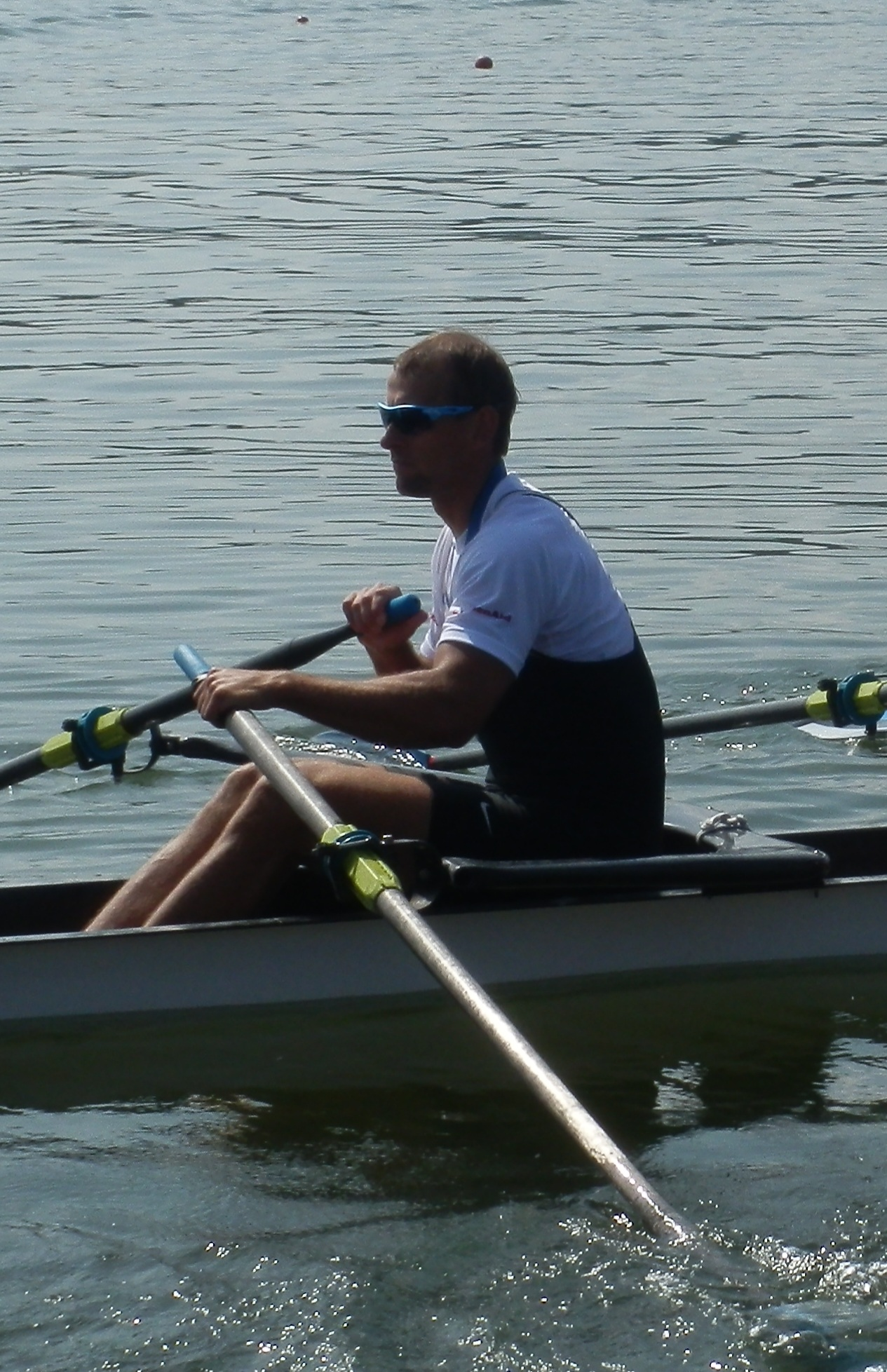 Tõnu Endrekson sulla barca dopo la premiazione con la medaglia d'oro agli Europei 2012